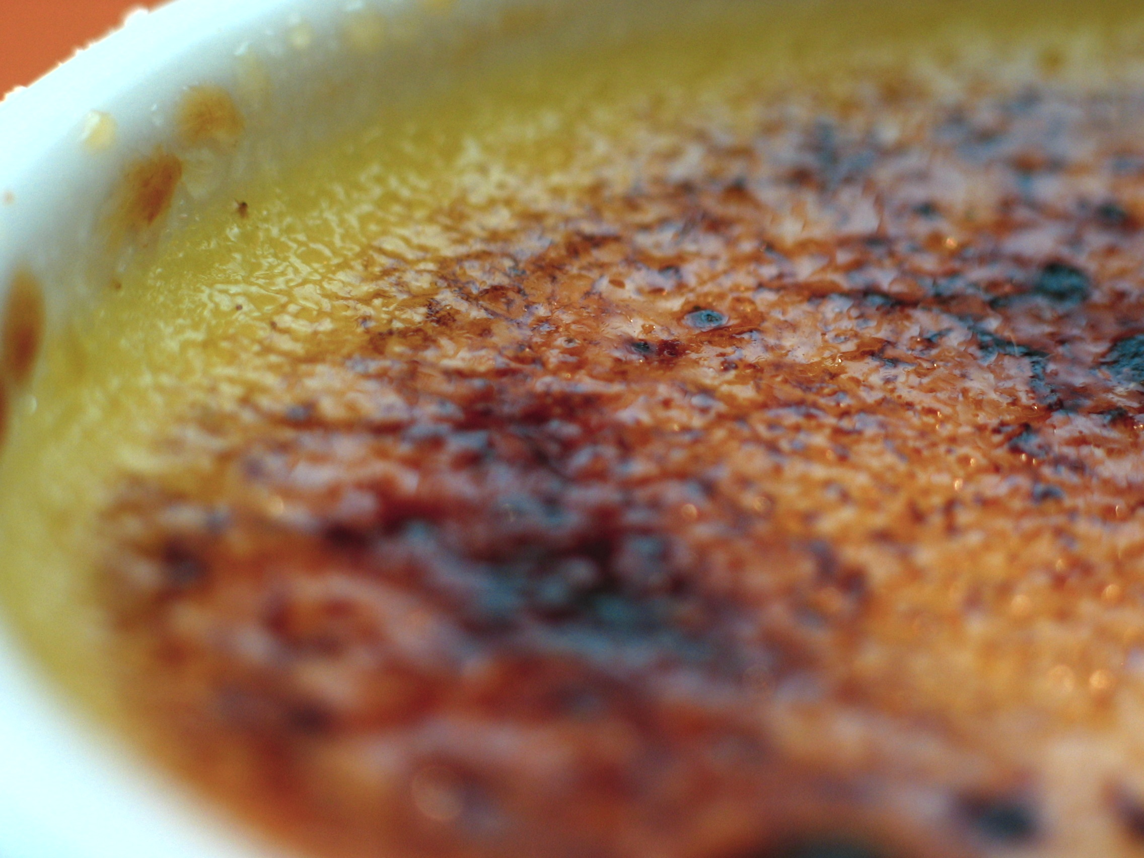 A closeup of crème brûlée.:)